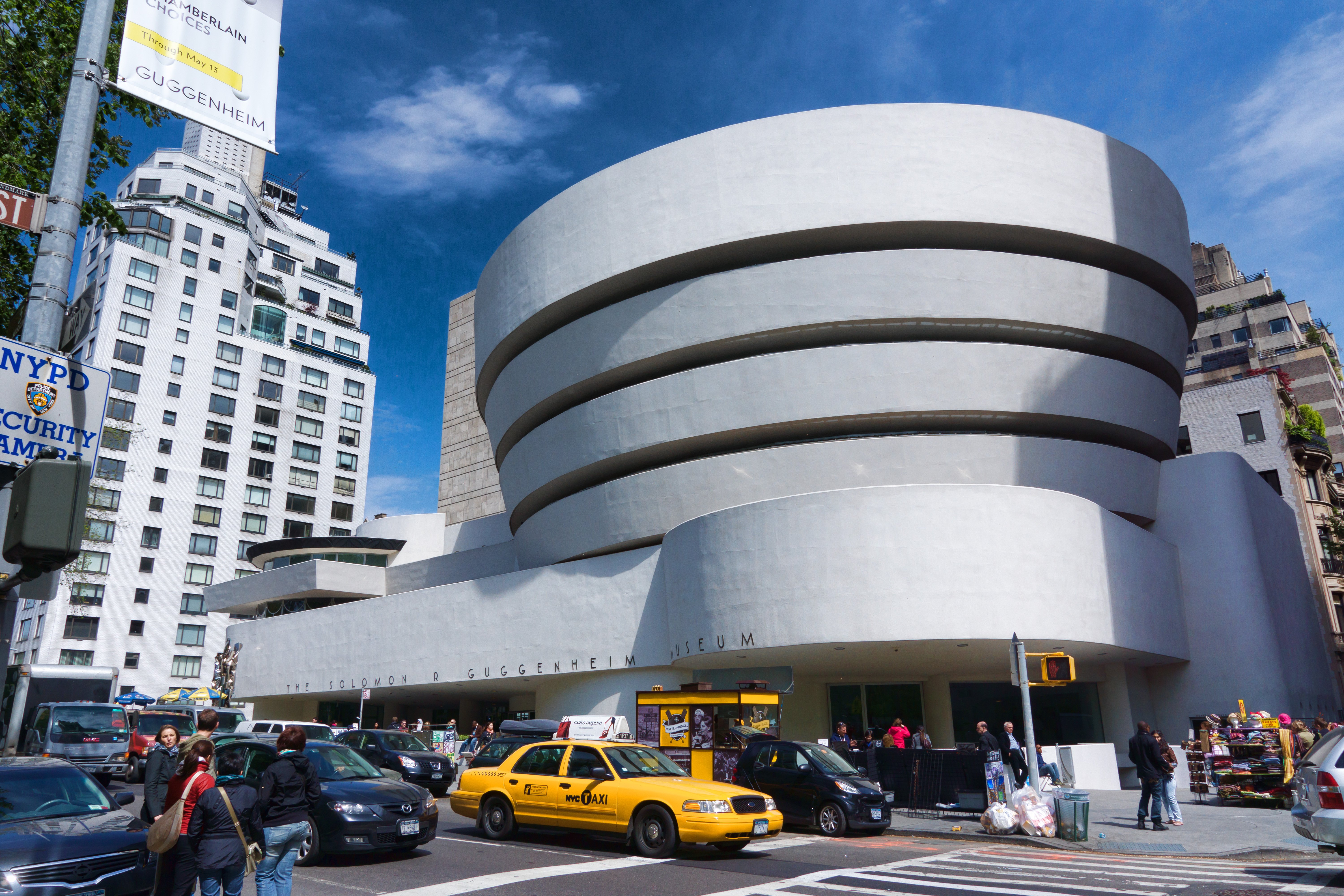 Solomon R. Guggenheim Museum